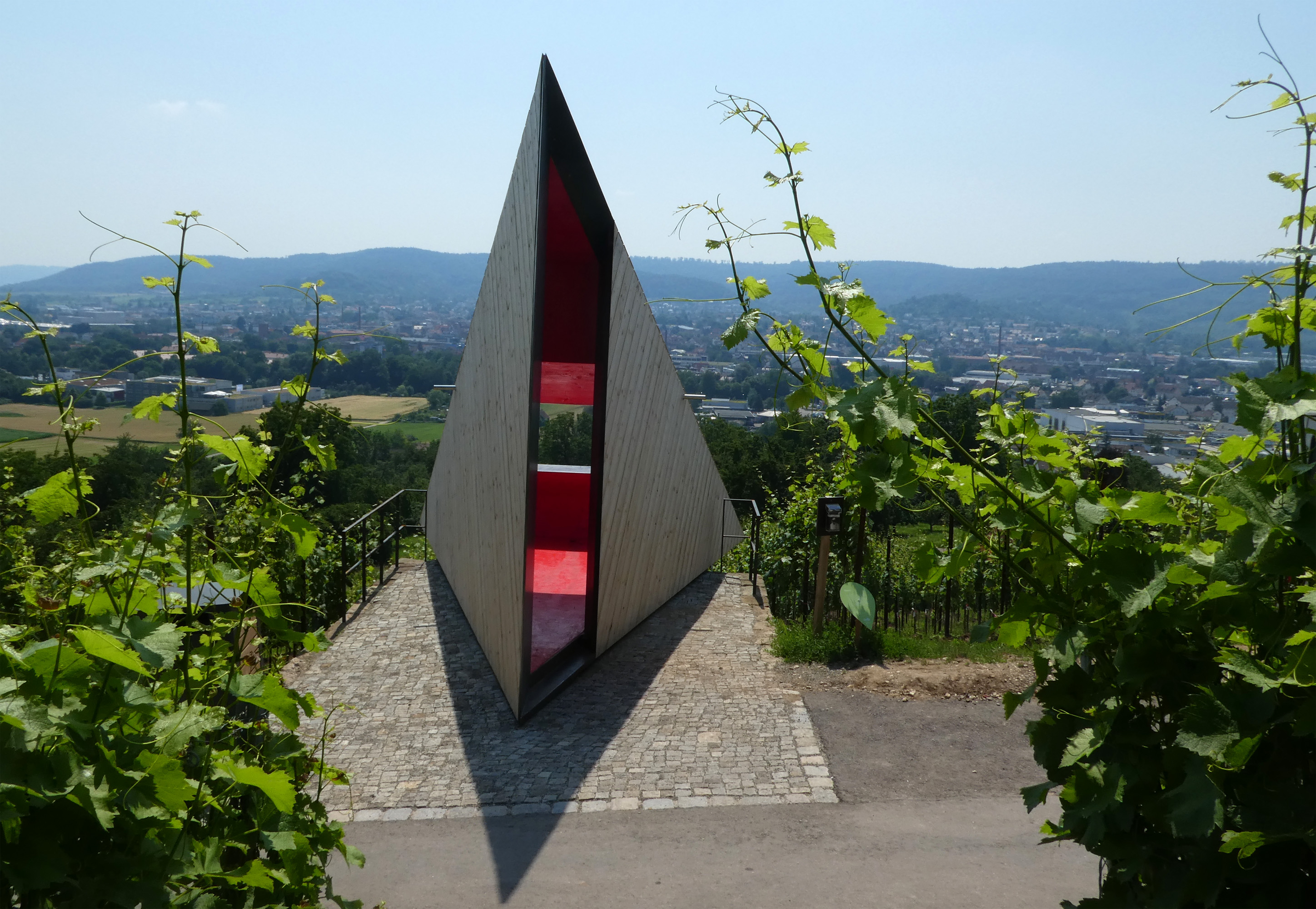 Schorndorf - "Prisma". Das Bauwerk entstand als Station 8 der "16 Stationen" der Remstal-Gartenschau 2019.